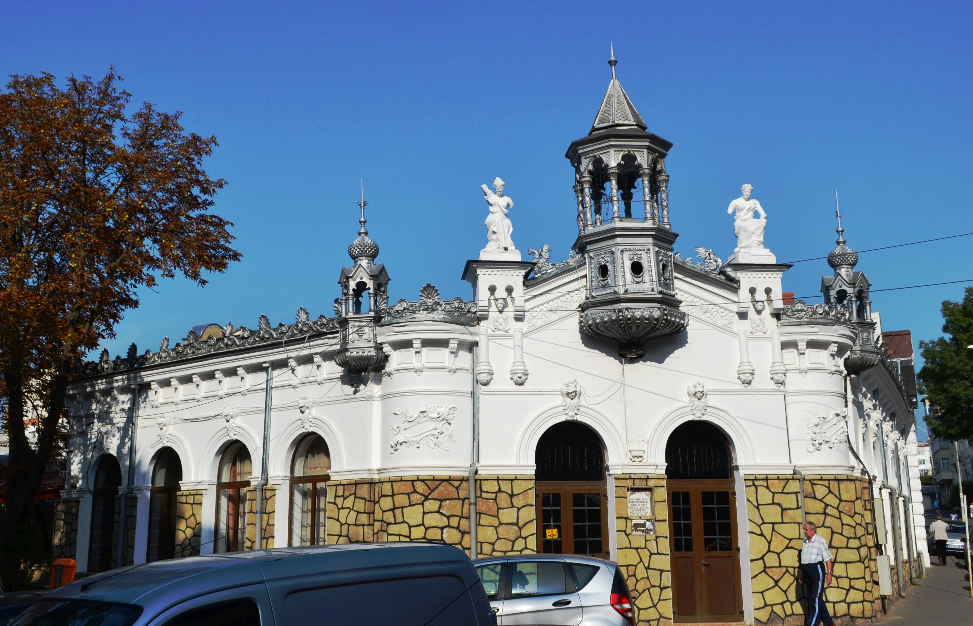 Casa Monasterianu, azi Restaurantul „Podgoriile Hușilor”, in care a fost oaspete Mihai Eminescu.